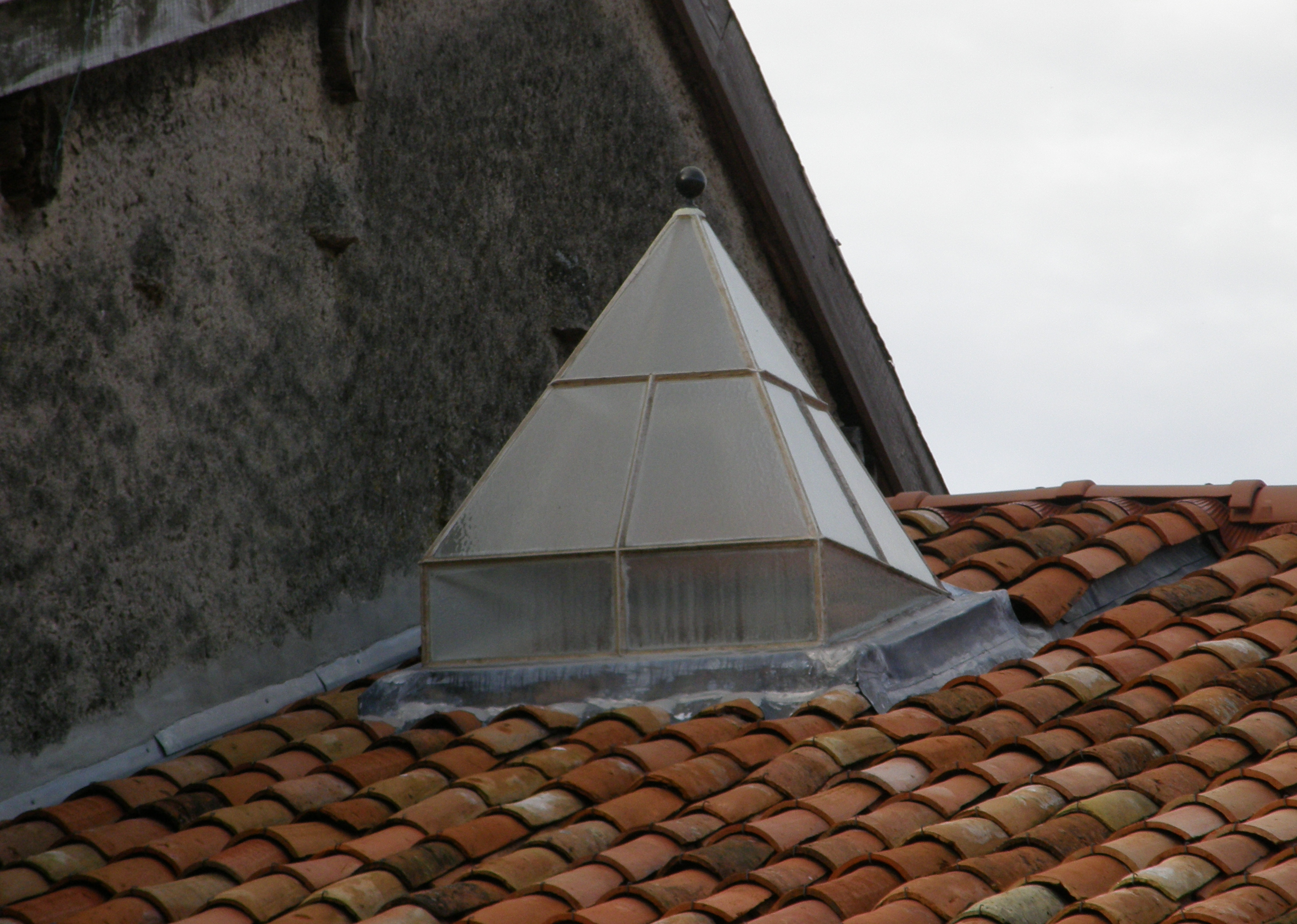 Toiture rénovée et flamande, à Murvaux (Meuse)